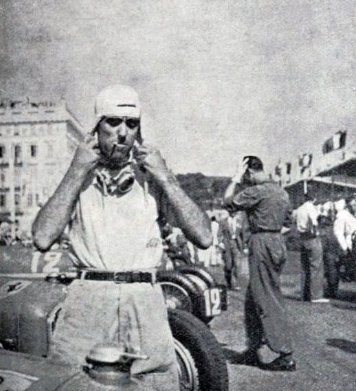 Tazio Nuvolari au départ du Grand Prix de Nice 1935 (à D. R. Sommer).